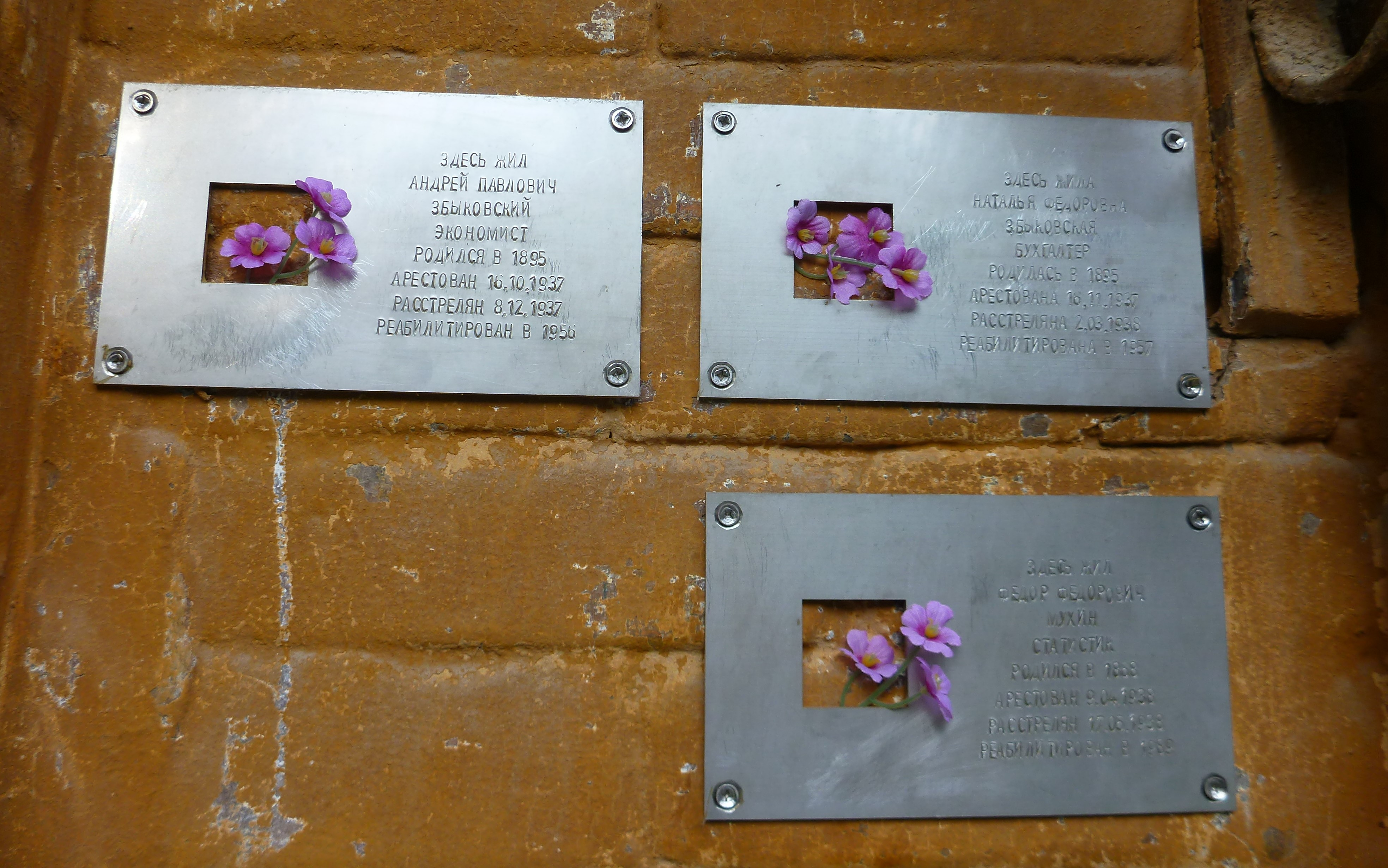 Таблички Последний адрес со сбитыми (от свинчивания посторонними) шлицами винтов на Гоголя 9 в Екатеринбурге 6 июля 2020 года